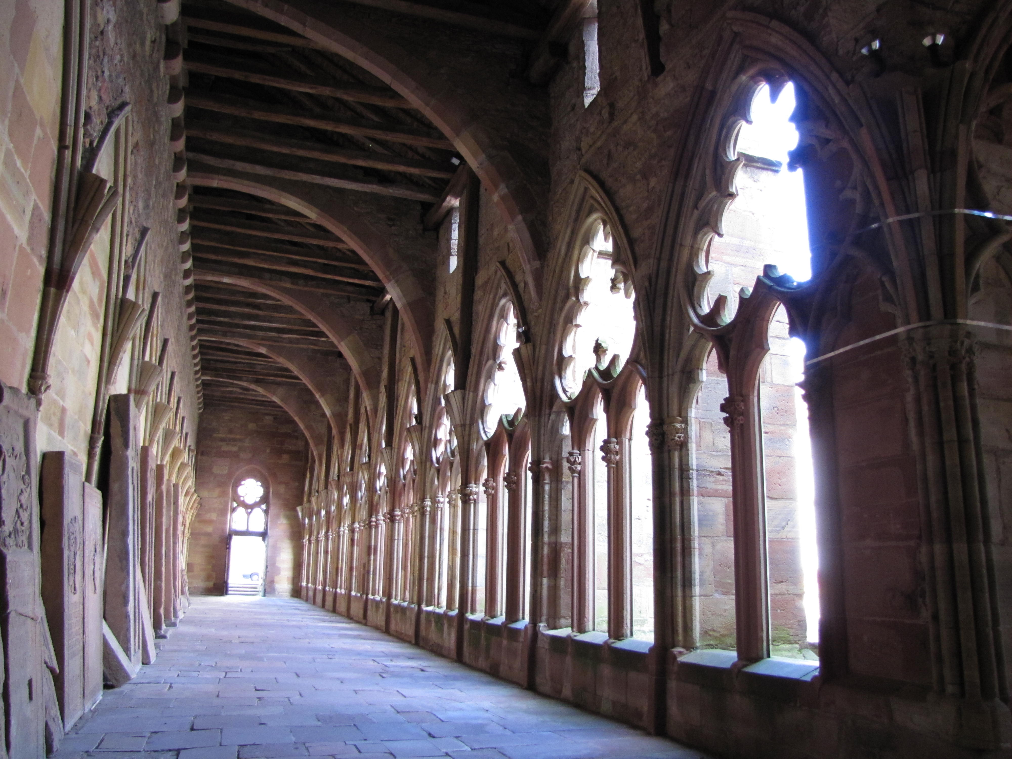 Alsace, Bas-Rhin, Wissembourg, Église abbatiale Saints-Pierre-et-Paul (PA00085247, IA67008036). Cloître gothique (XIVe) (IA67008038).